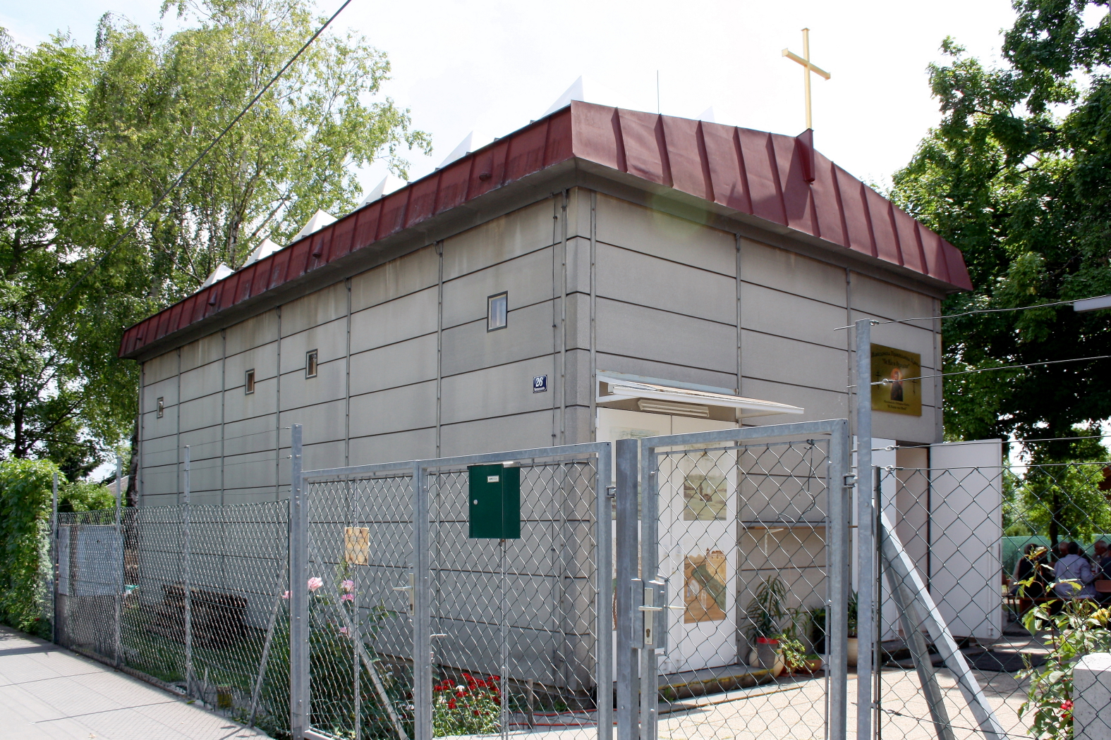 Die Außenansicht der Kirche in der Siemensstraße 26, Wien.